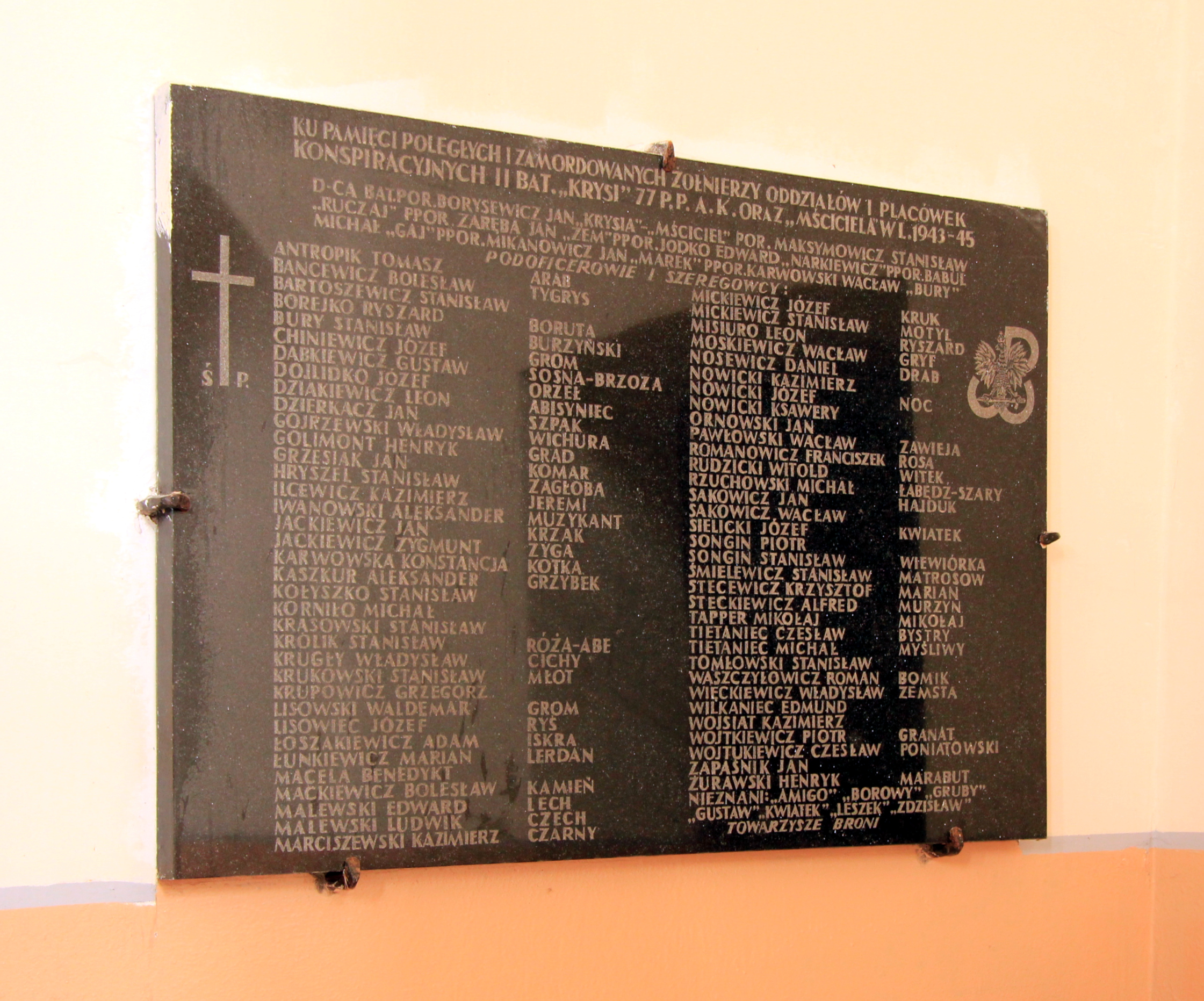 Nacza, rejon werenowski, obwód grodzieński, Białoruś - Kościół parafialny Niepokalanego Poczęcia NMP - tablica pamięci poległych żołnierzy AK